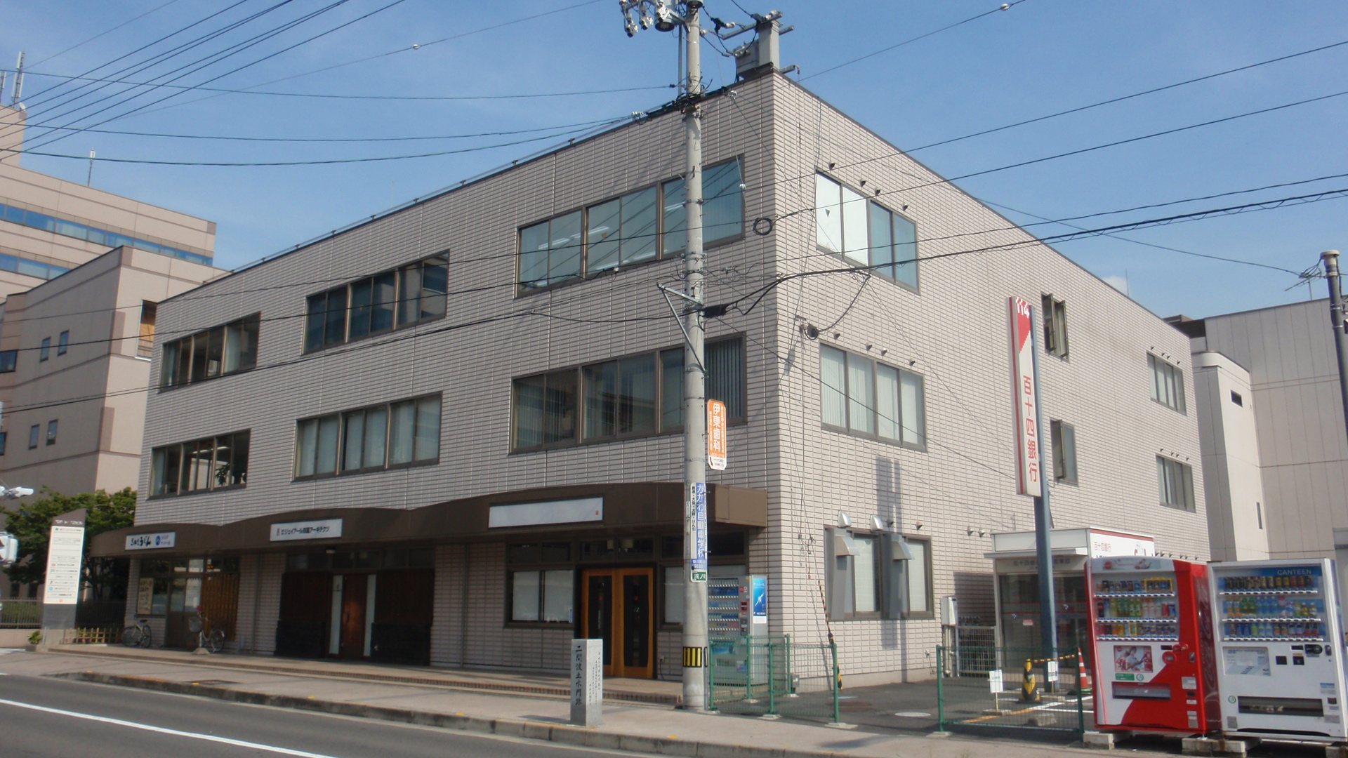 香川県高松市の四国旅客鉄道（JR四国）本社ビルに隣接する高松JR第2ビル。